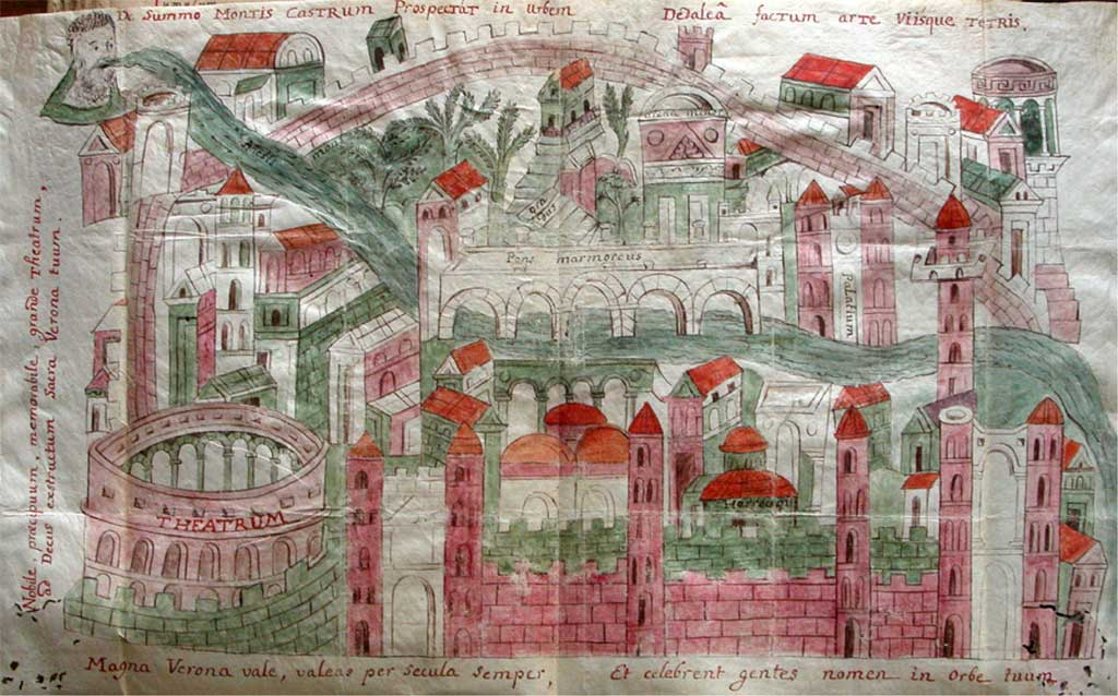 L'iconografia rateriana, la più antica rappresentazione della città di Verona conosciuta. Copia de XVIII secolo. L'originale è della metà del X secolo